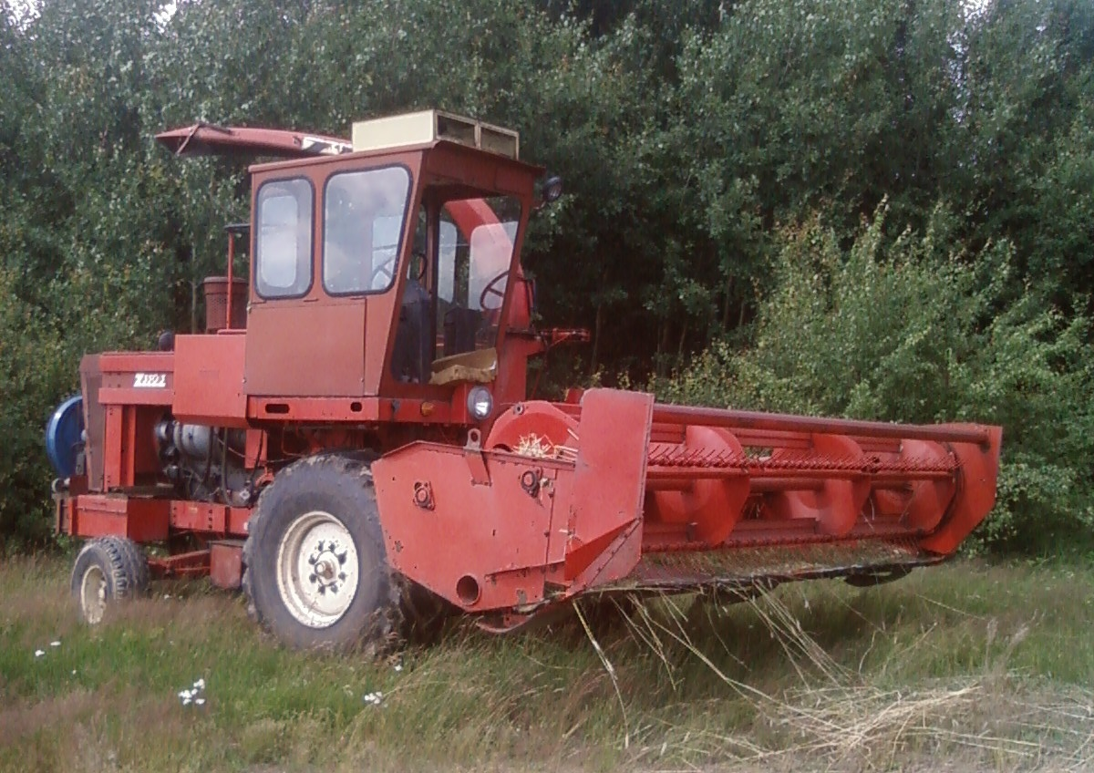 Sieczkarnia Z350/3 z zespołem Z341 - prawy bok